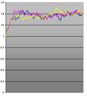 Pfade eines CIR-Prozesses.